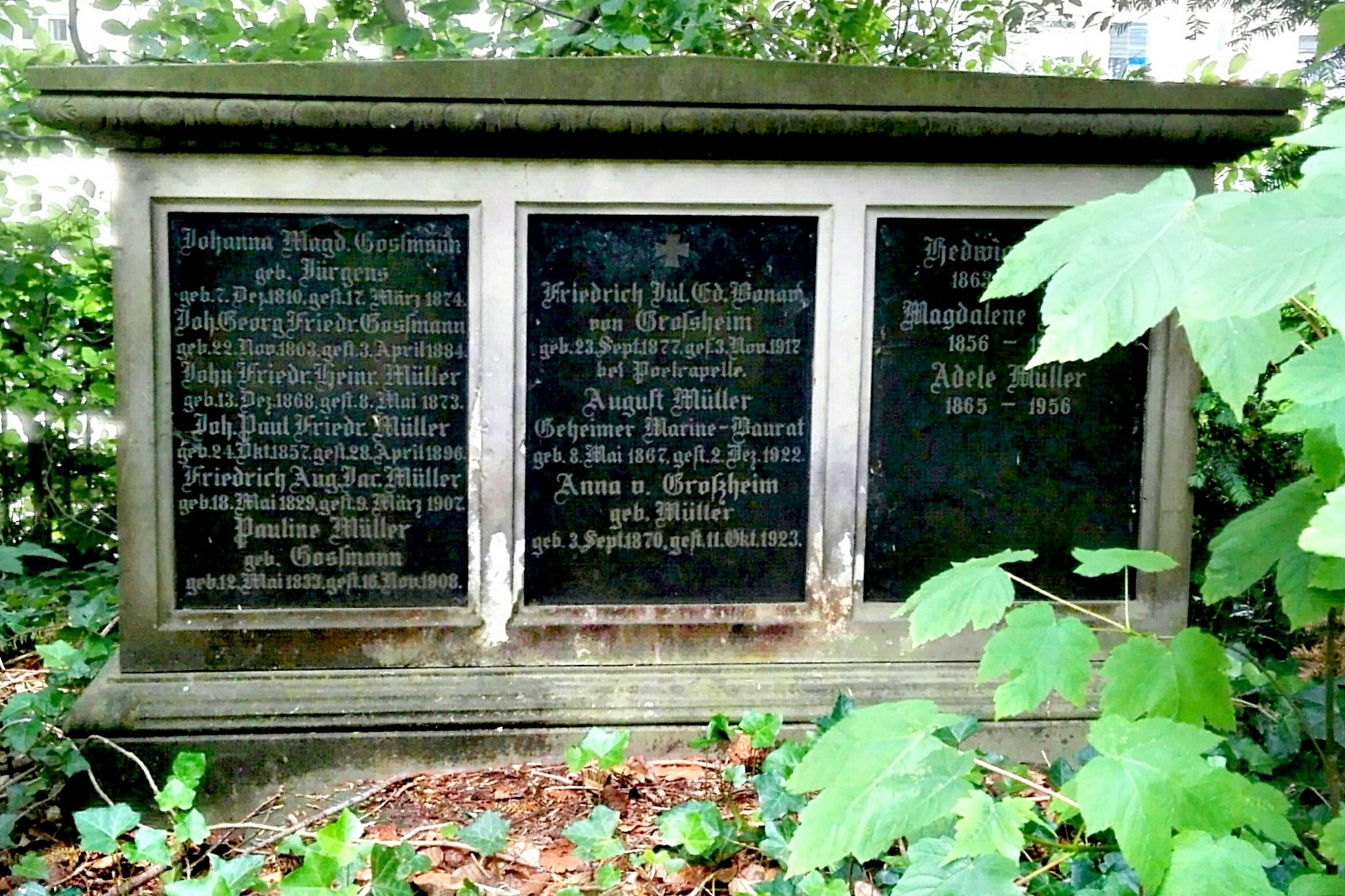 Das Müllersche Familiengrab auf dem Burgtorfriedhof in Lübeck.